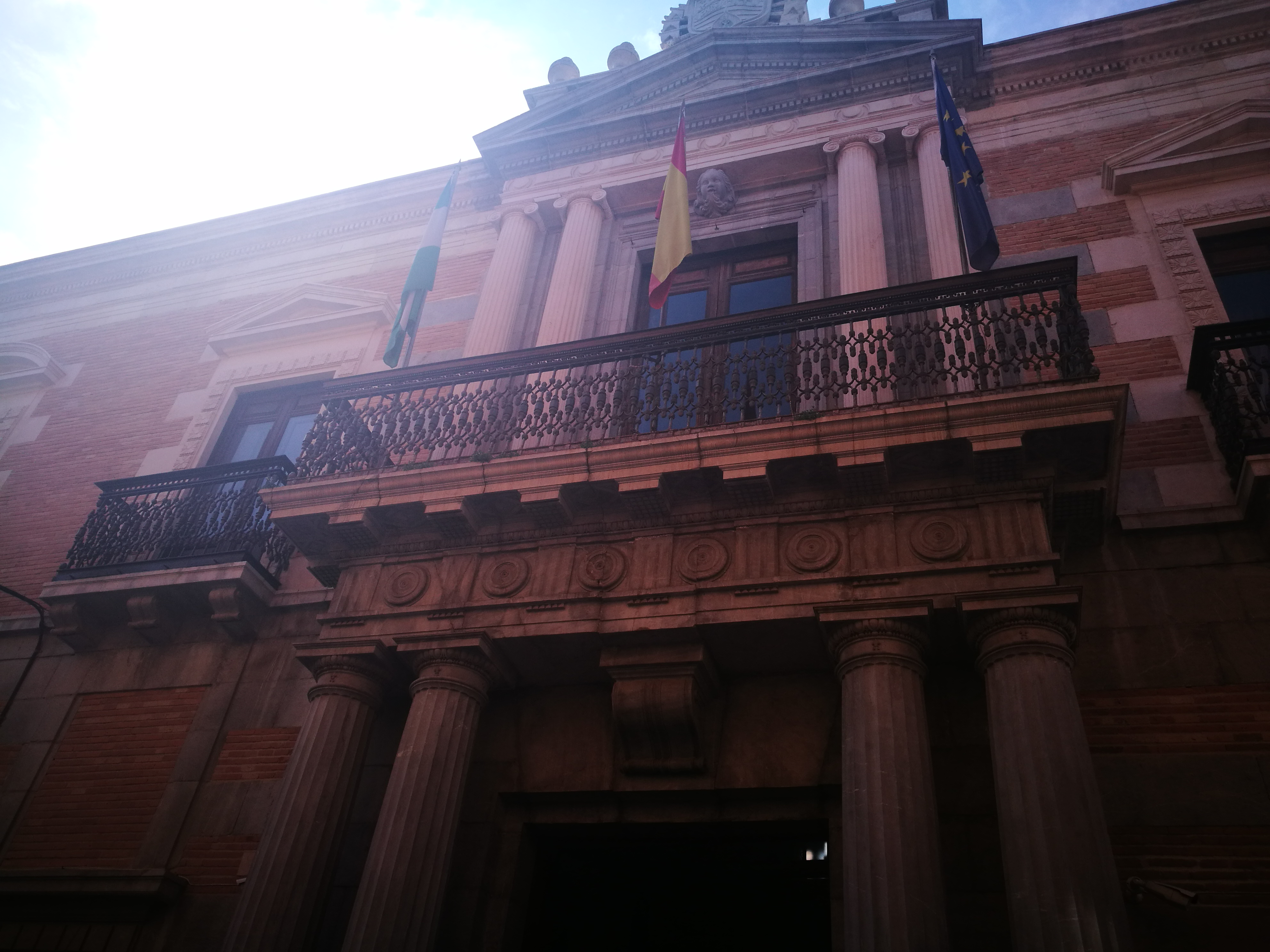 Fachada Palacio de las Columnas (Facultad de Traducción e Interpretación)